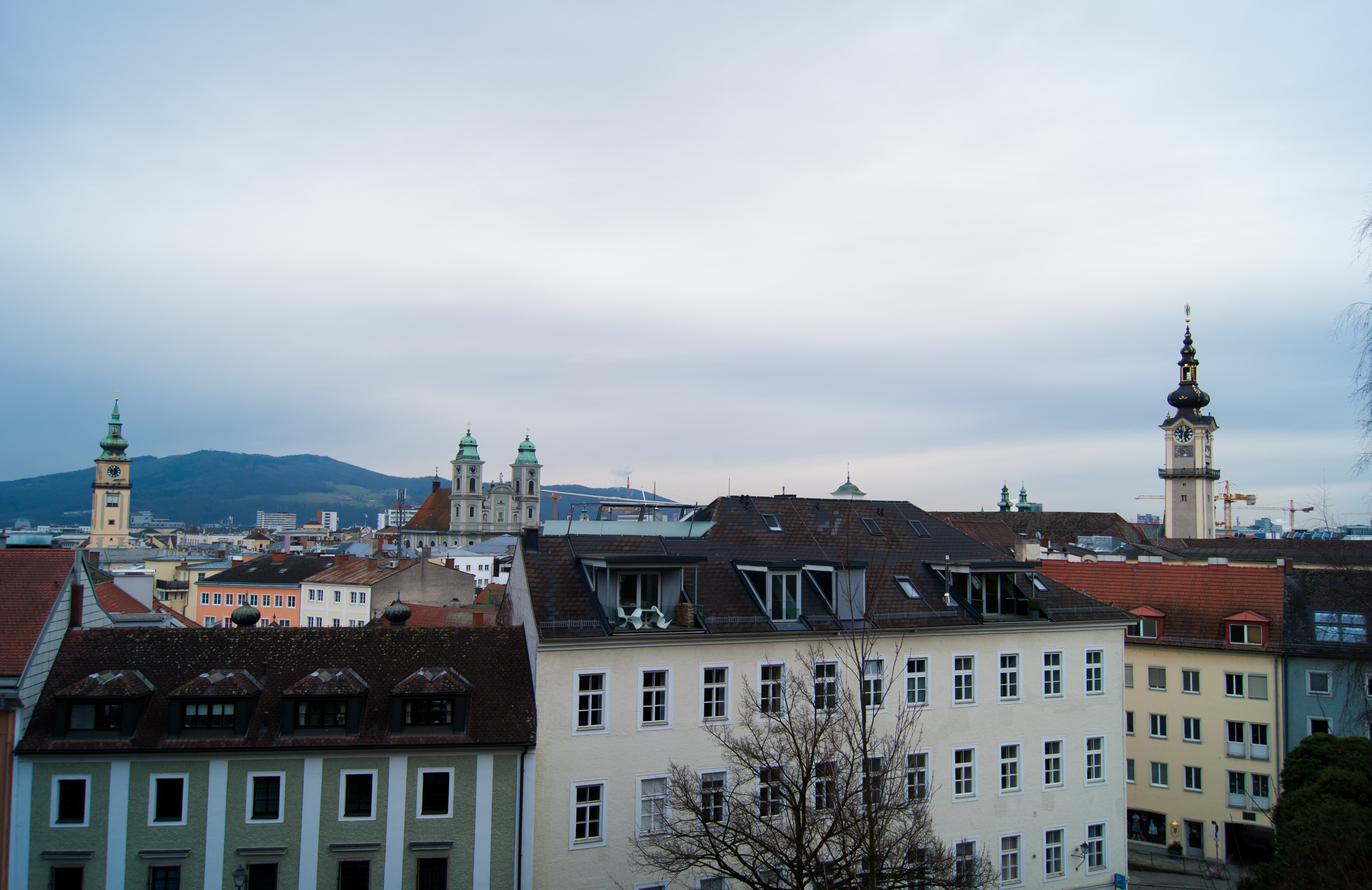 Linz landscape